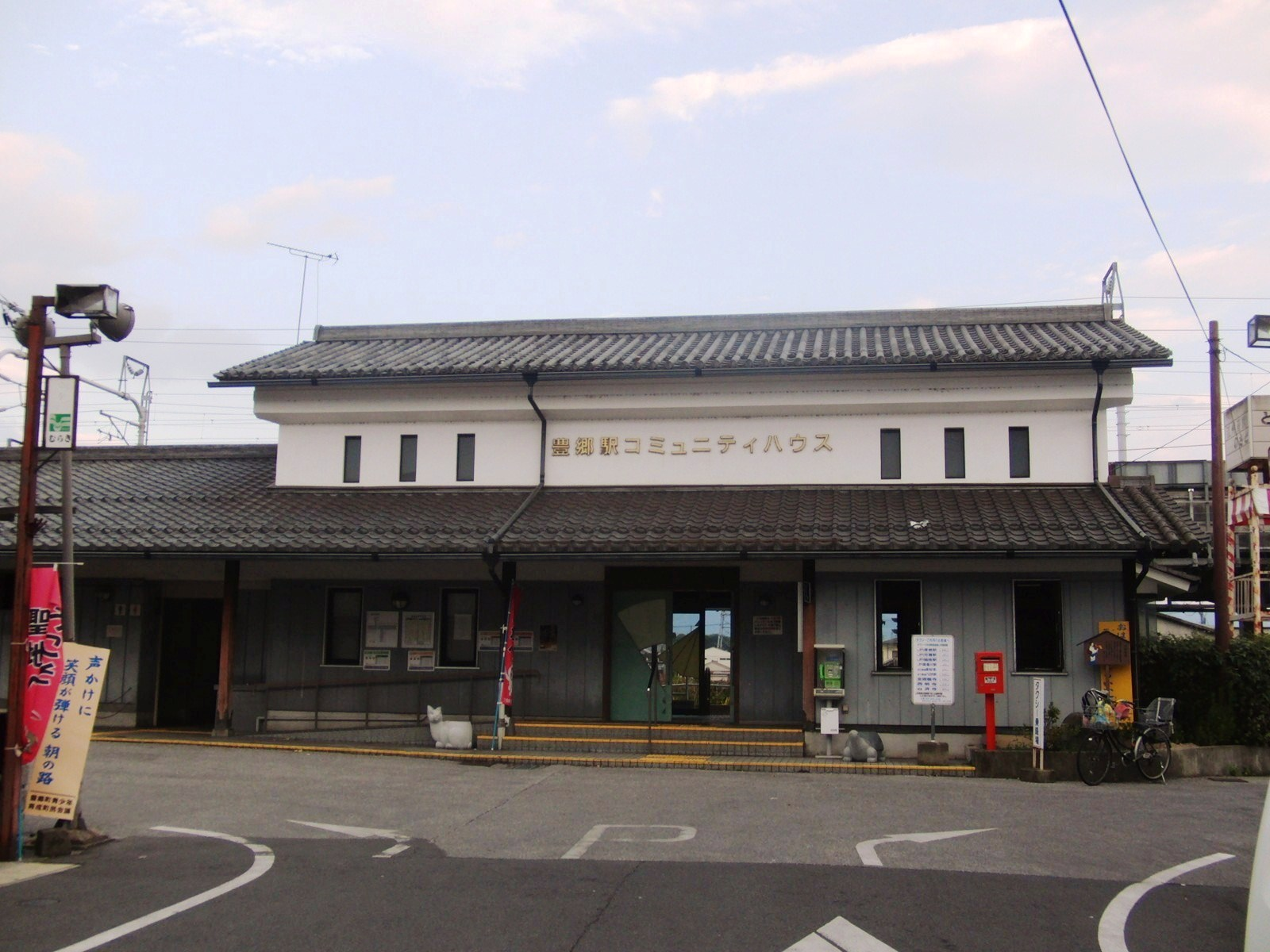 近江鉄道豊郷駅を撮影